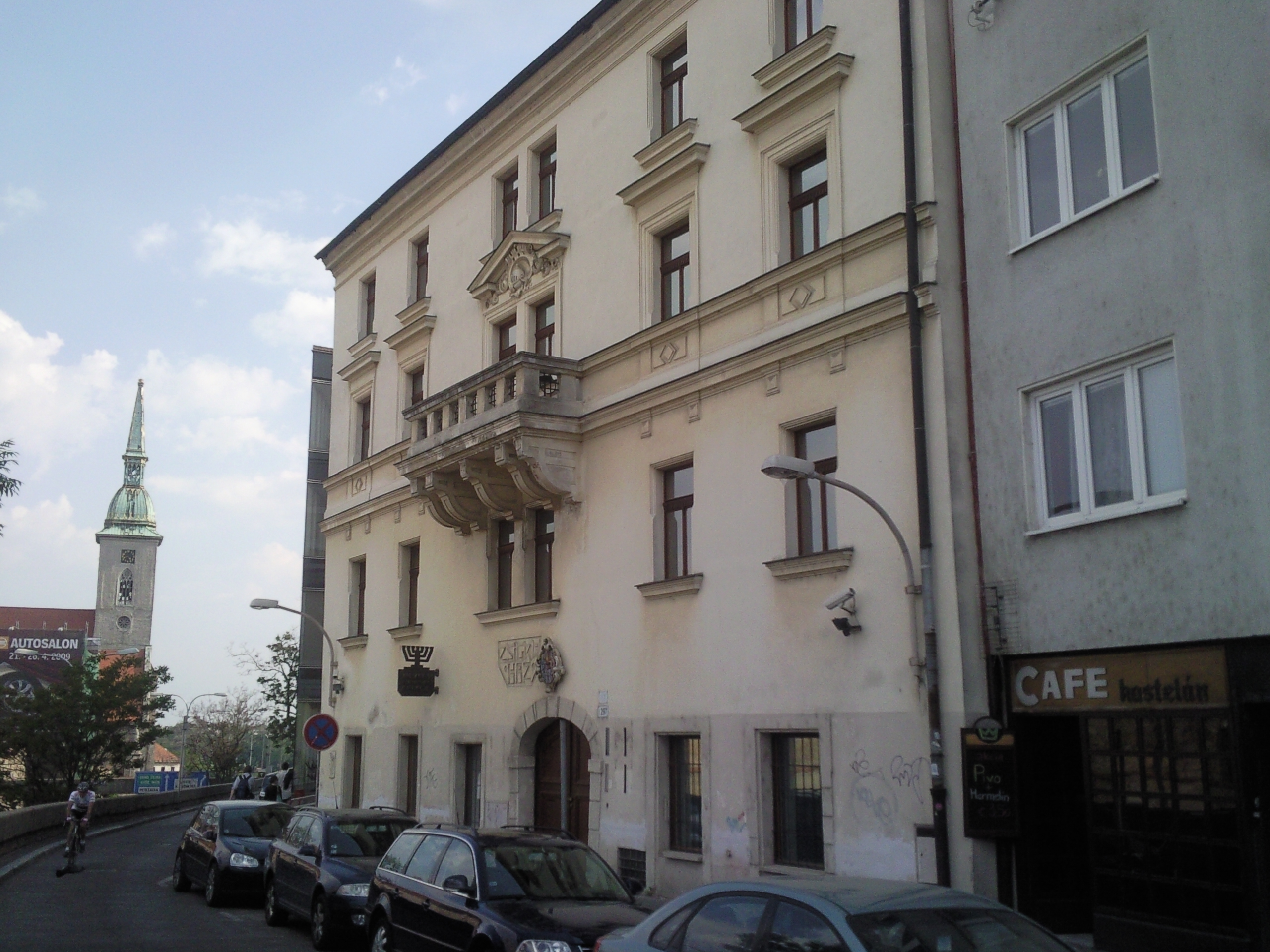 Žigraiova kúria, Židovská, Bratislava